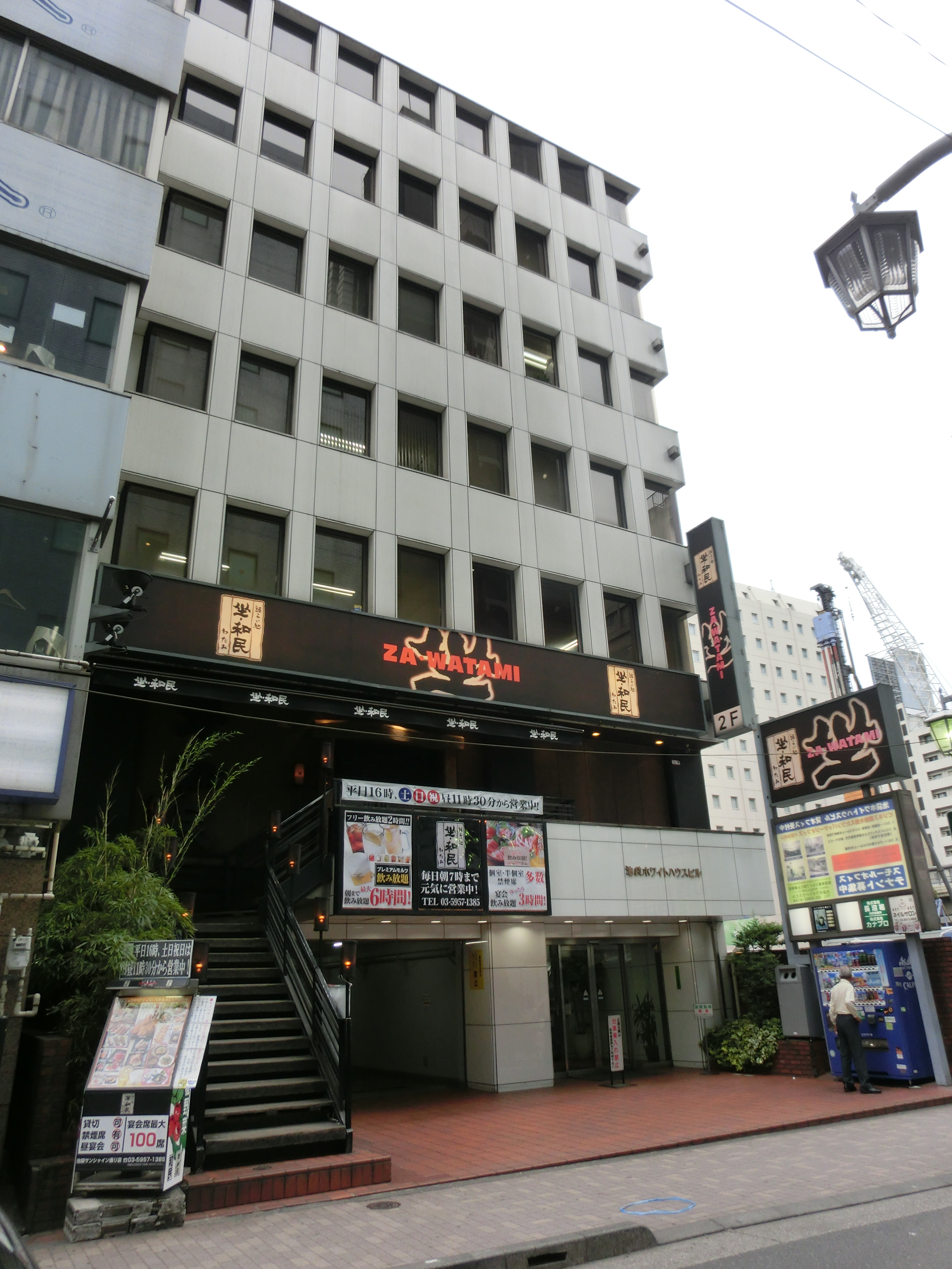 鹿島学園高等学校通信制課程東京校の所在地